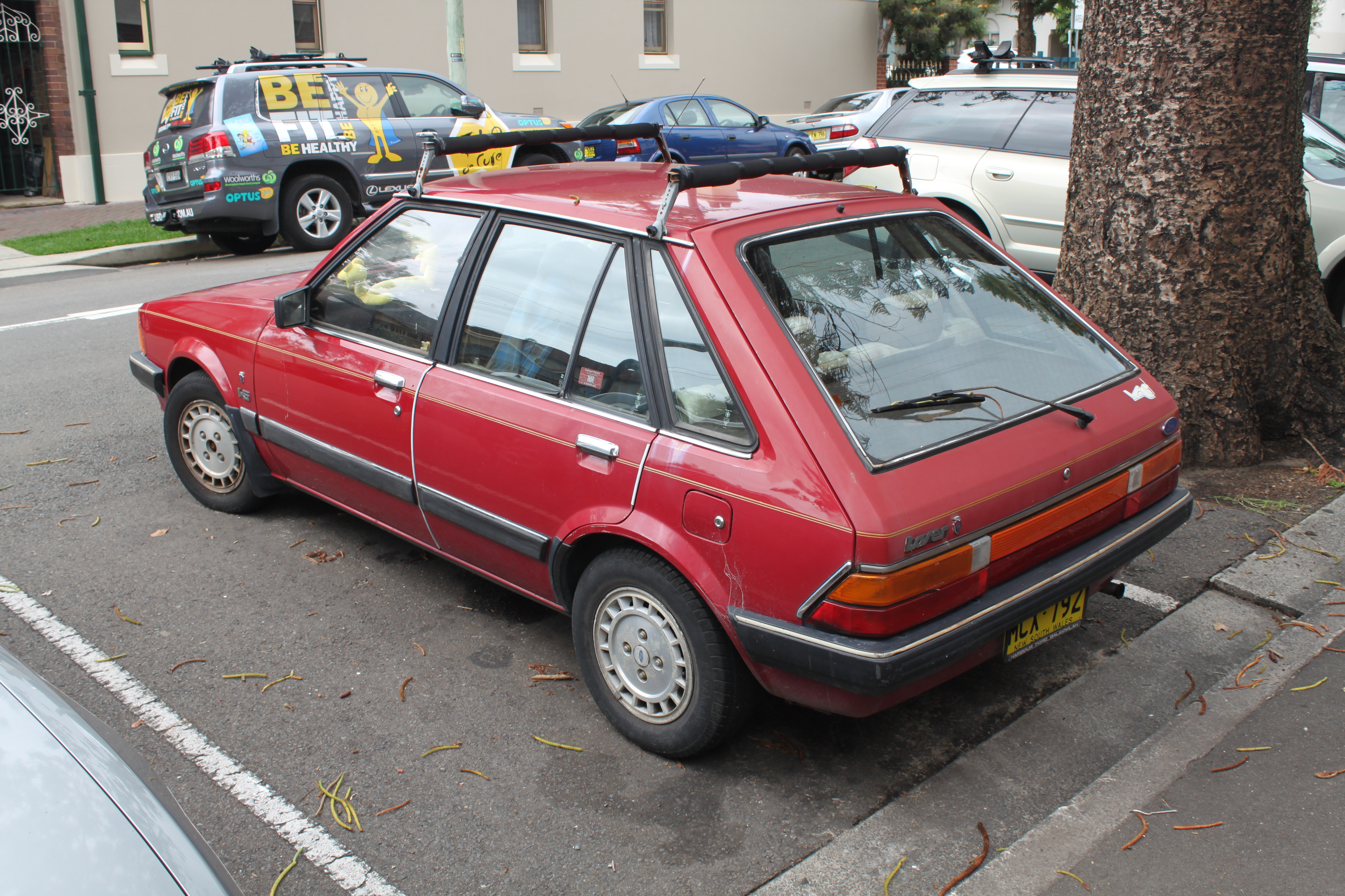 Ford Laser KA Ghia